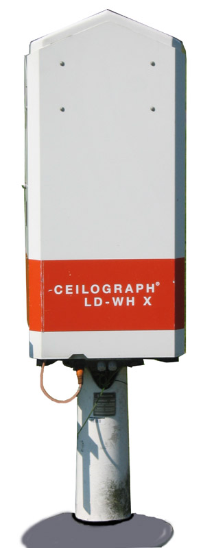 Wolkenhöhenmessgeräet